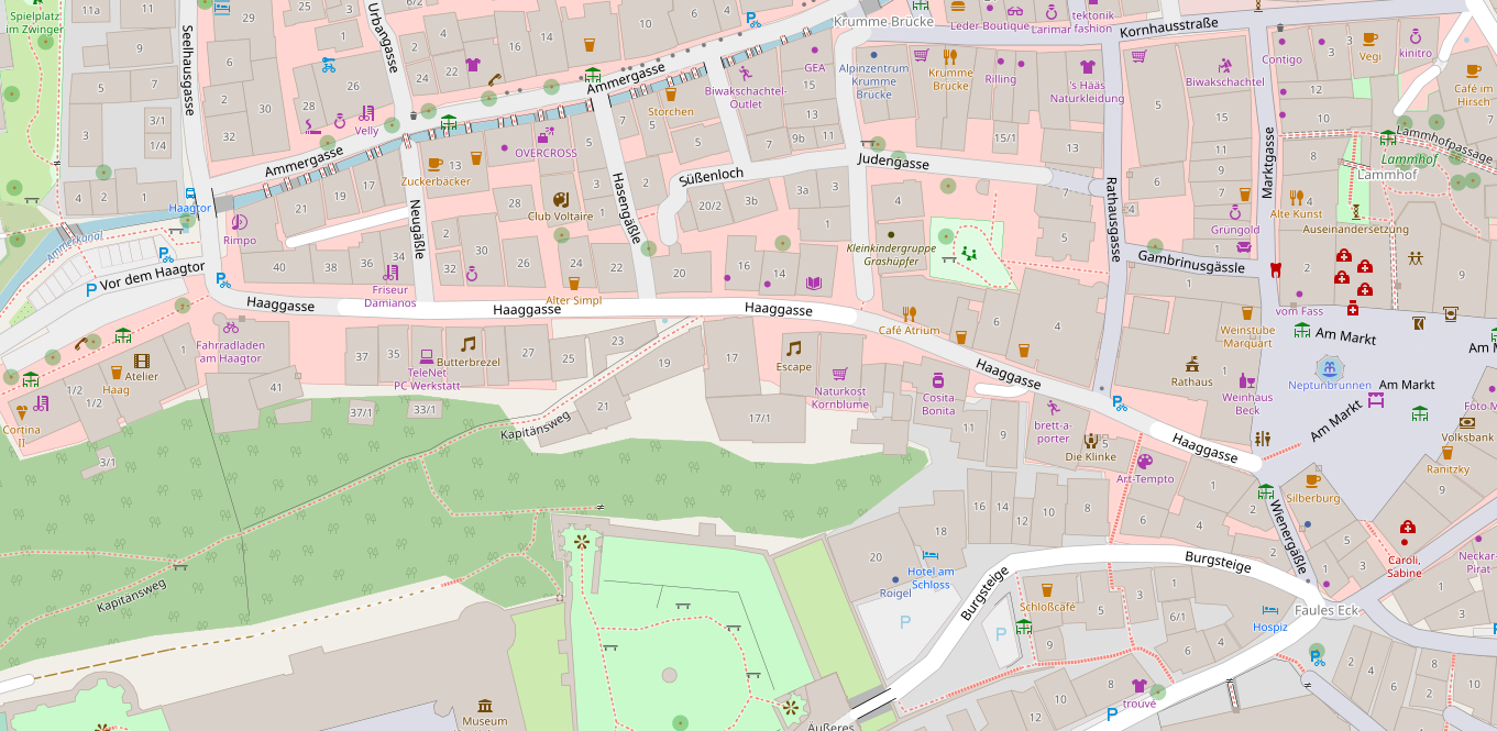 Haaggasse in Tübingen (OpenStreetMap)